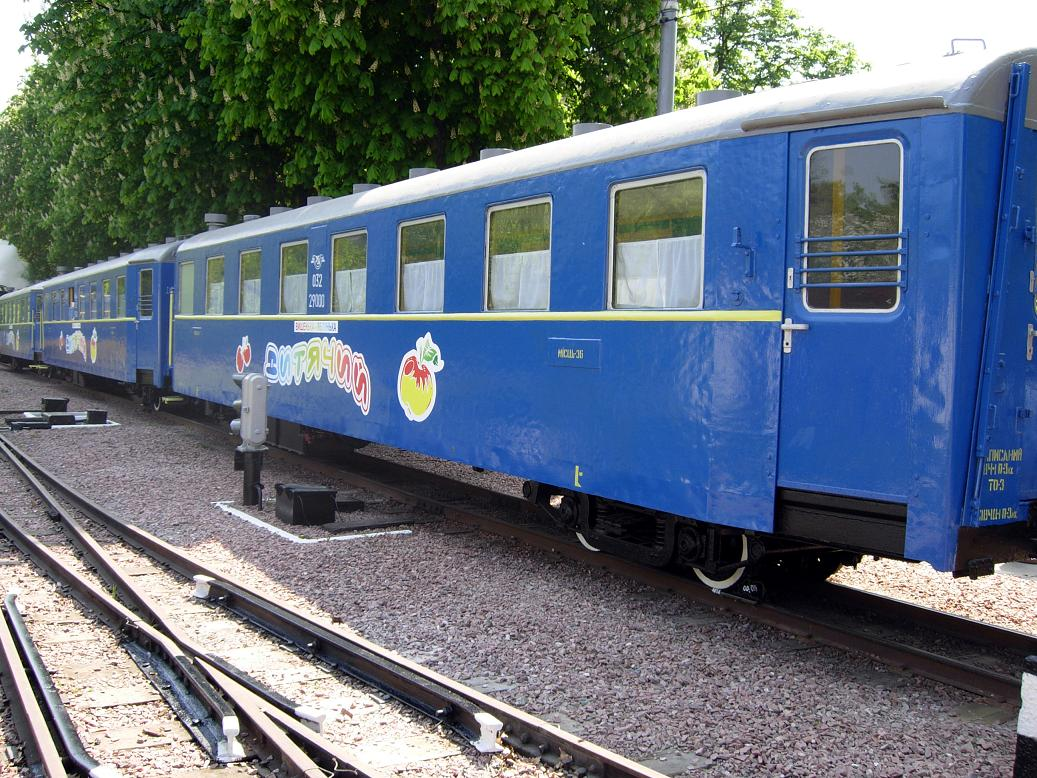 Вагони «Pafawag» Київської дитячої залізниці